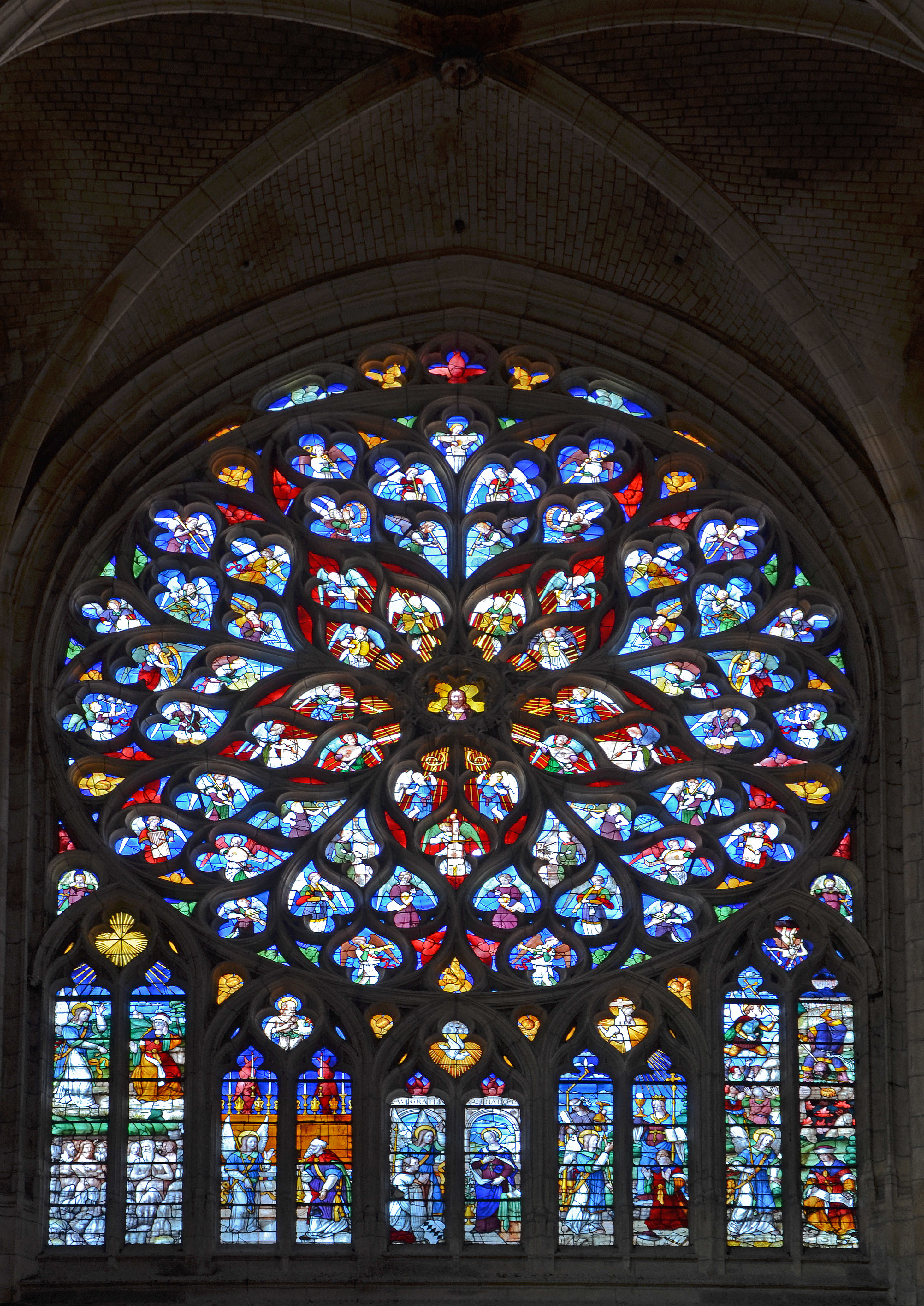 Rosace du transept de la cathédrale de Sens, Yonne, Bourgogne, France